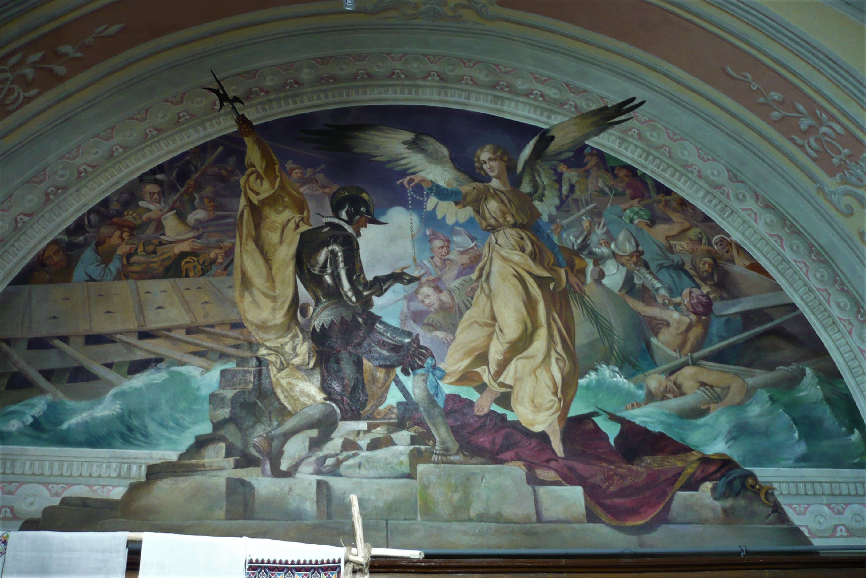 Klasztor dominikanów we Lwowie. Malowidło ścienne